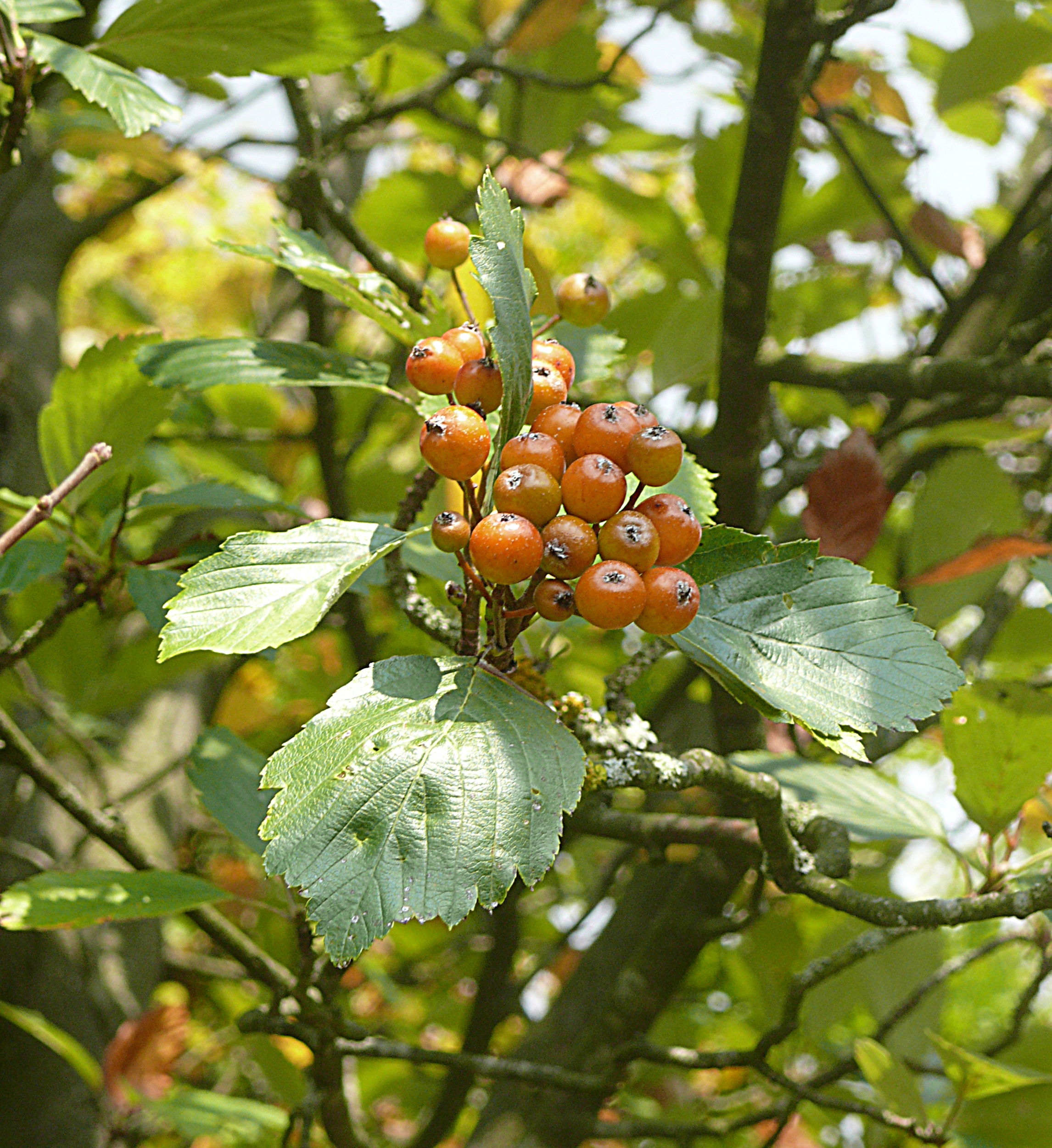 Sorbus seyboldiana, Tauberland